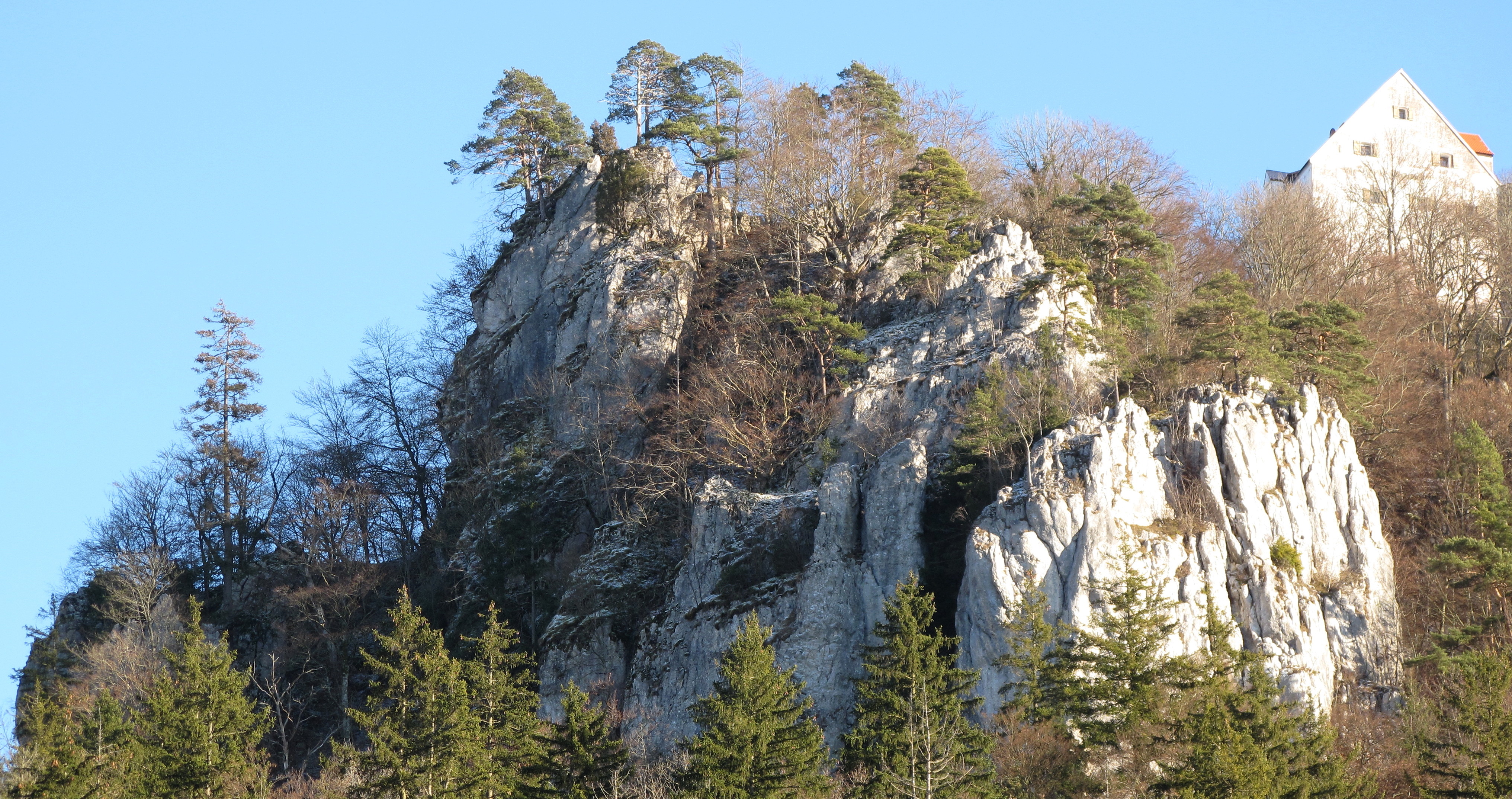 Nordostseite des Altwildensteiner Burgfelsen wenig unterhalb von Neu-Wildenstein (heute Jugendherberge) gelegen - Blick vom Donautal.